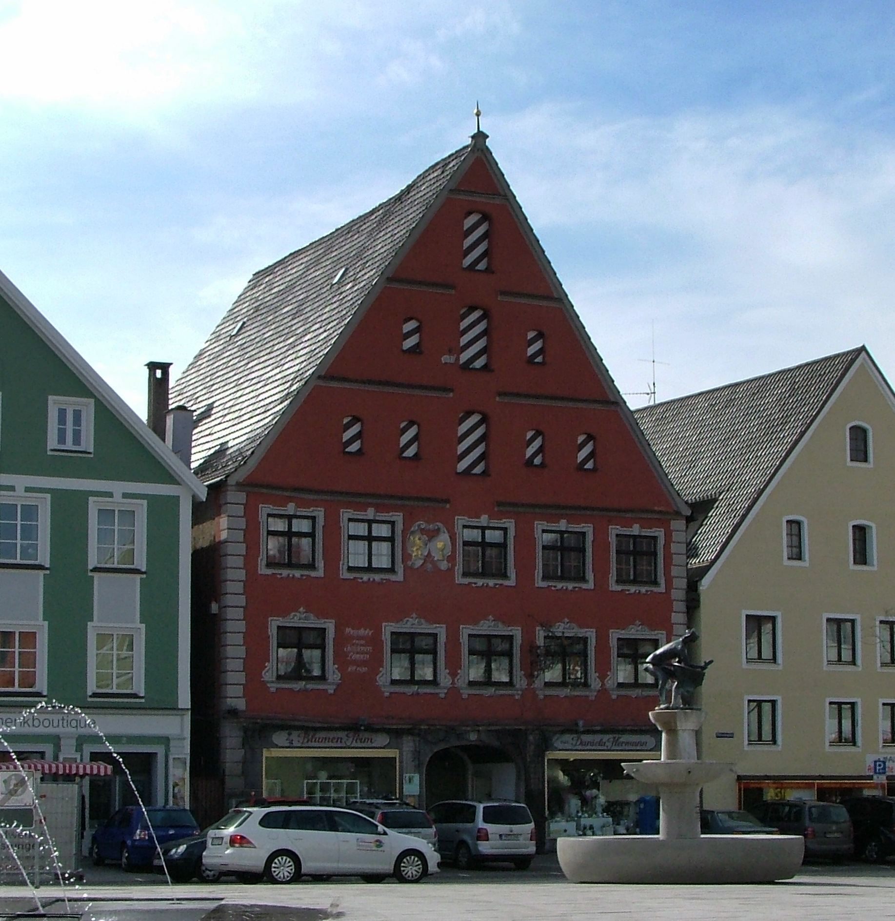 Schrannenplatz